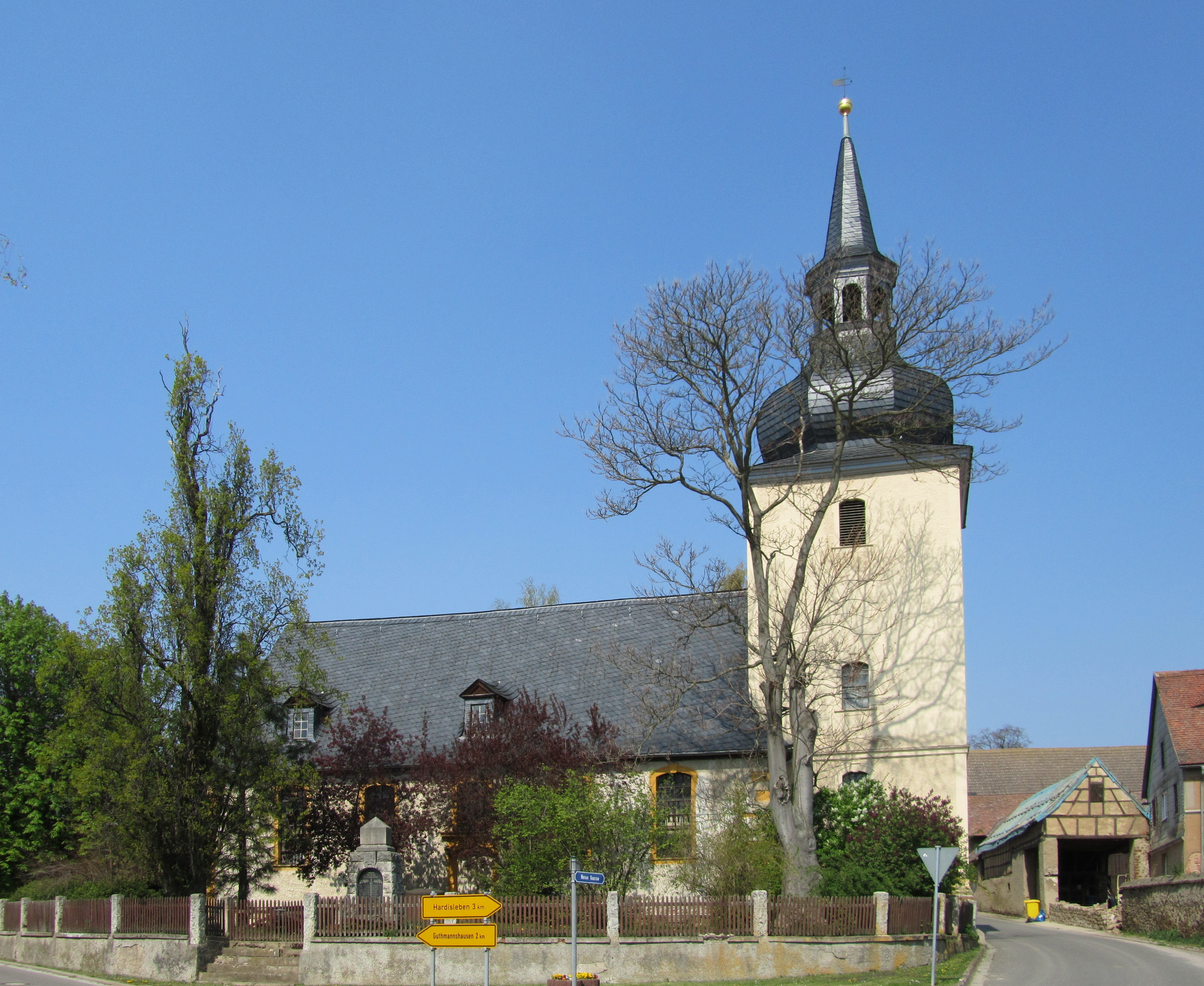 Die Kirche von Mannstedt (Thüringen).